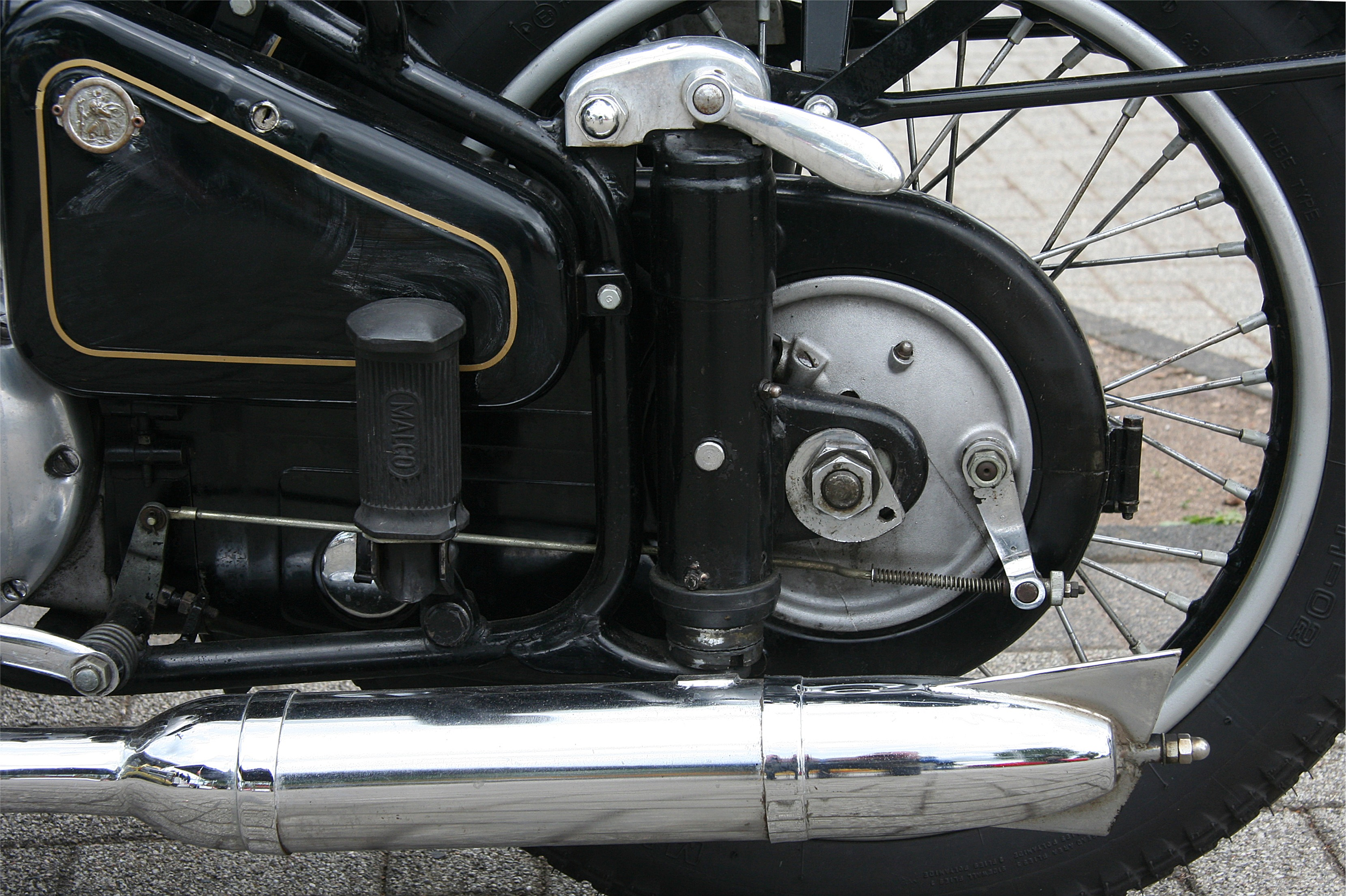 Hinterradaufhängung einer NSU Konsul I, Baujahr 1952, mit verstellbarer Teleskopfederung